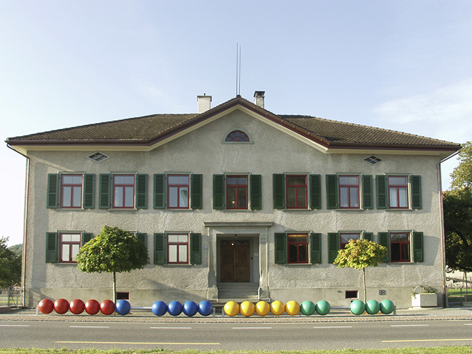 Schulmuseum Mühlebach in Amriswil, Frontansicht